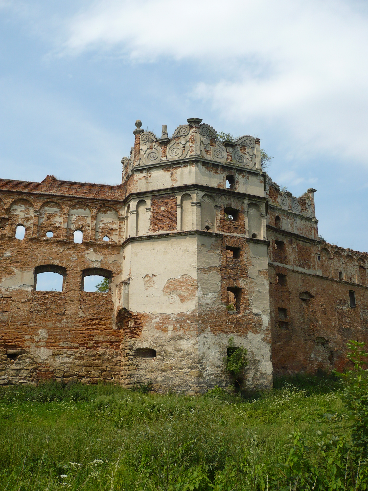 Stare Sioło - zamek księcia Zasławskiego, wieża.